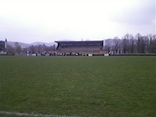 Stade de football de Cluny (71)